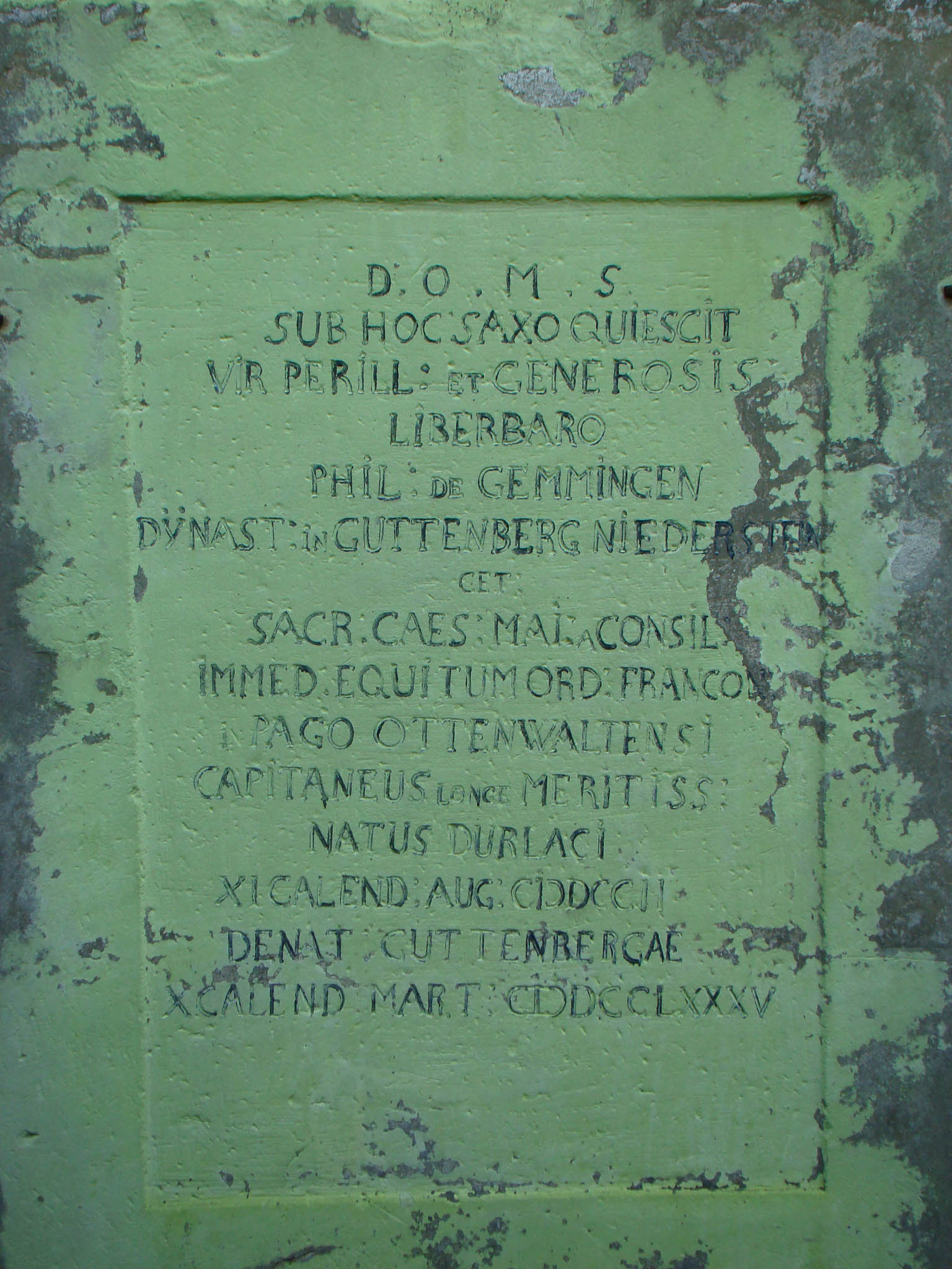 Historisches Grabmal der Familie von Gemmingen-Guttenberg bei der Burgkapelle der Burg Guttenberg in Haßmersheim-Neckarmühlbach